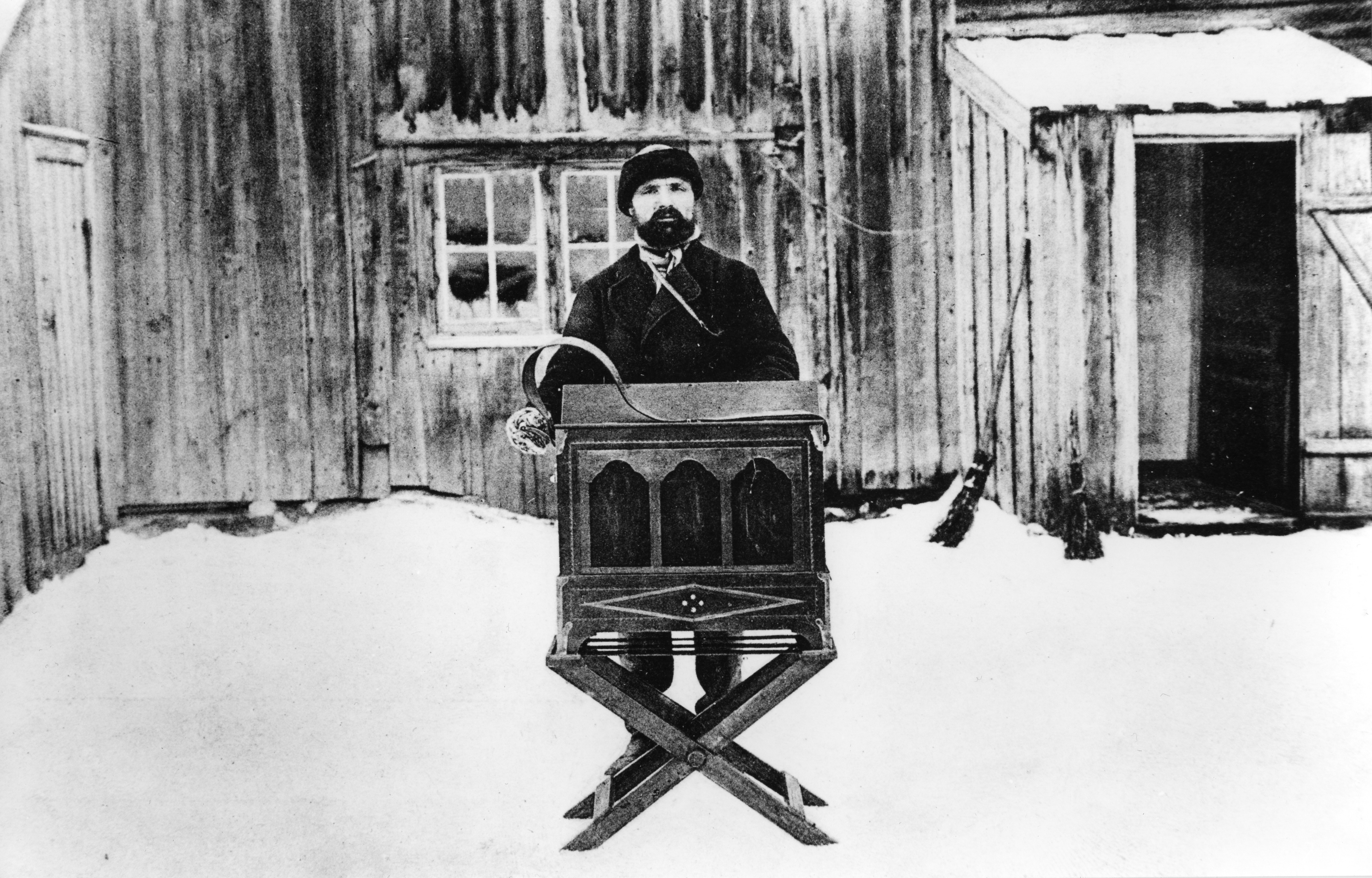 Format: Fotopositiv Dato / Date: Ukjent, mulig 1920-årene Fotograf / Photographer: Ukjent Sted / Place: Trondheim Wikipedia: Fossestuen Digitalarkivet: Peder Torsets husholdning - "Nidarlid" i Steinberget (Folketellingen 1900) Eier / Owner Institution: Trondheim byarkiv, The Municipal Archives of Trondheim Arkivreferanse / Archive reference: Tor.H43.B75.F5255 Peder Olsen Torset var født 1873 i Aure og var dreng hos E. D. Mogstad i Dronningens gate i mange år. Han var kjent for å spille på positiv (lirekasse) i Trondhjem. På søndager brukte han å dra til Fossestuen. År 1900 bodde han hos familien Mogstad i Steinberget. Kilder: - Folketellingen 1900 - Notater etter tidligere Byarkivar Løkhaug